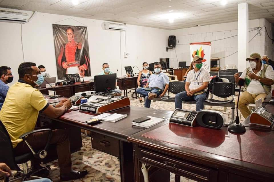 Cabildantes elegidos democráticamente.